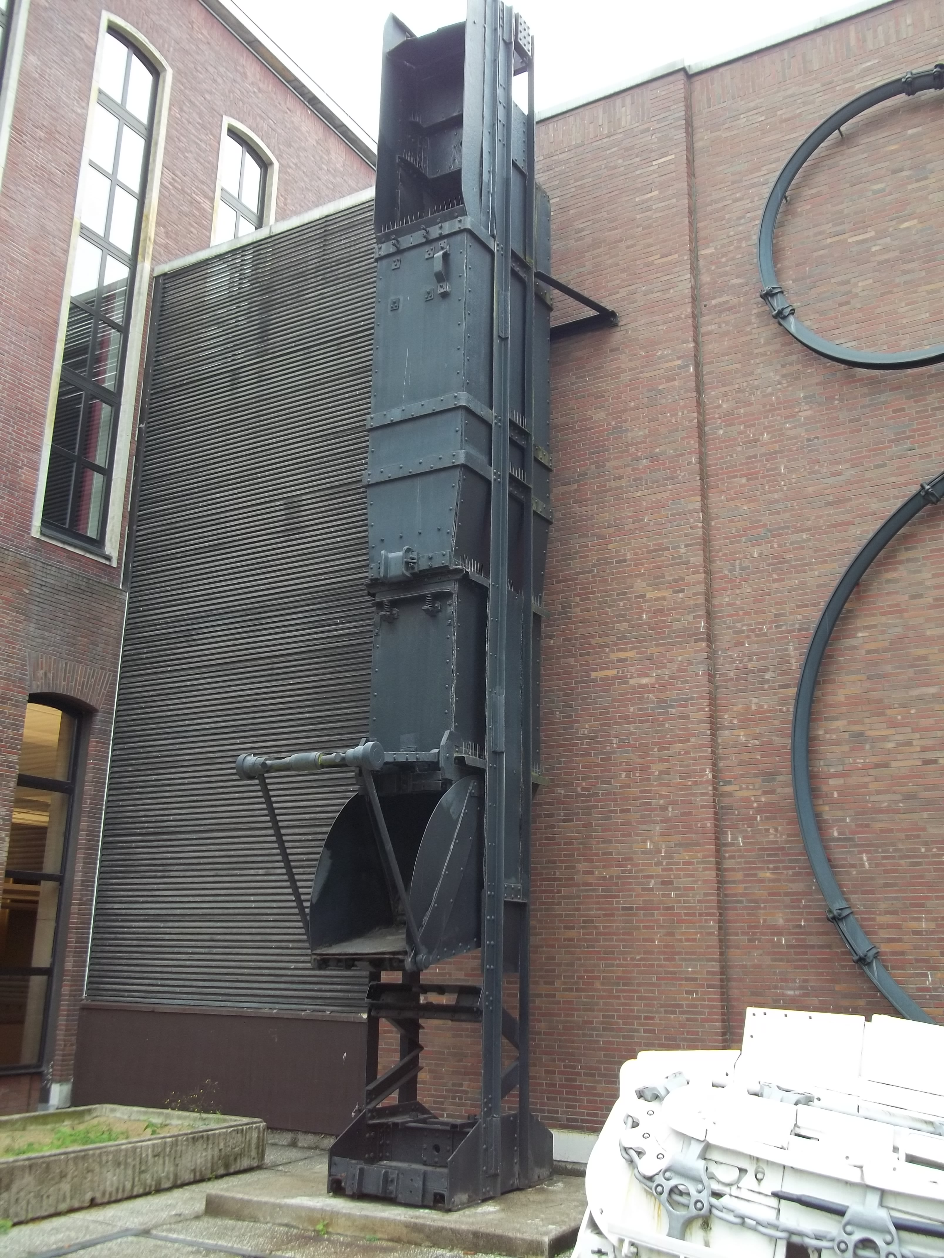 Deutsches Bergbau-Museum Bochum in Bochum.